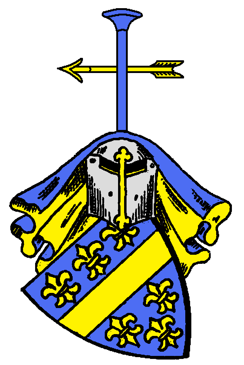 Stammwappen der Wrbna (von Würben), altes schlesisch-böhmisch-mährisches Adelsgeschlecht, auch in kaiserl. röm.-dt. Diensten.